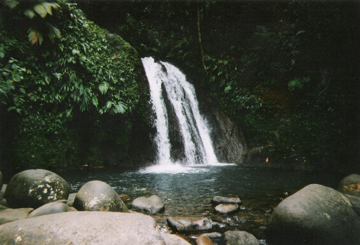 Cascade de Guadeloupe (971), FRANCE